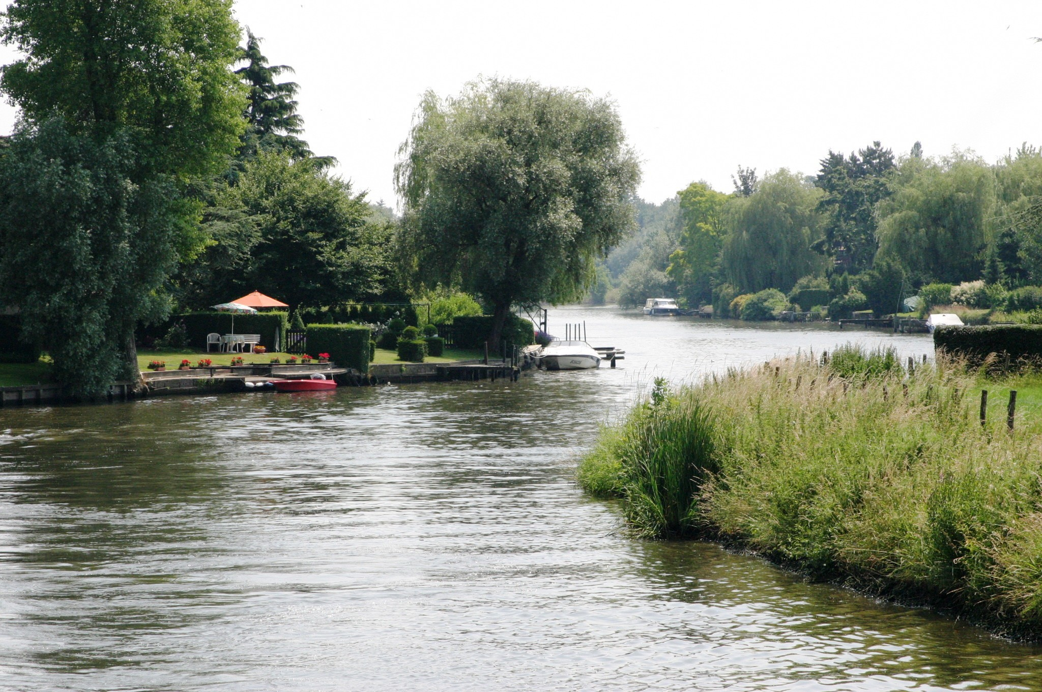 D'Leie bei Roselaere.